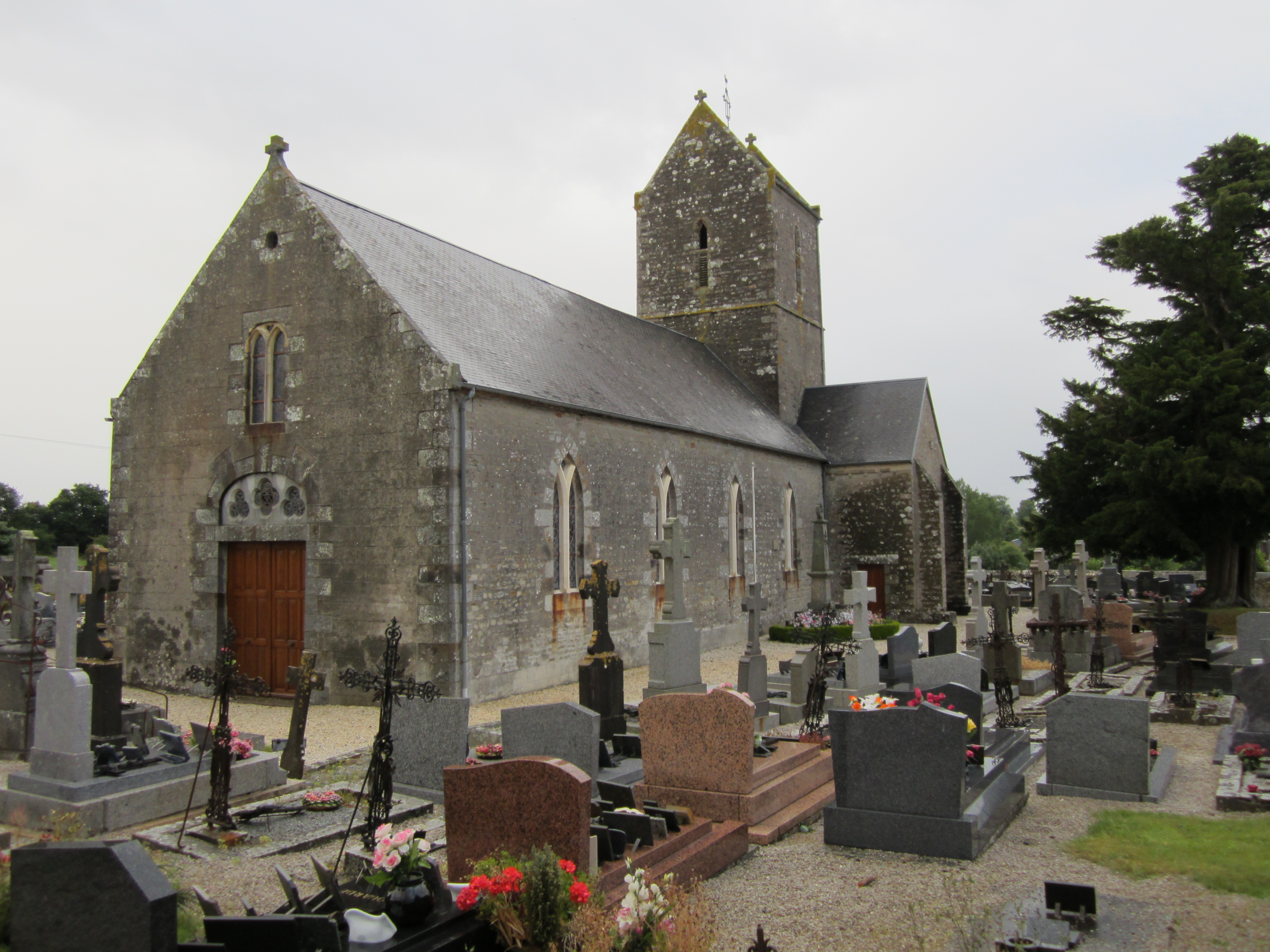 Église Saint-Georges de Coudeville-sur-Mer